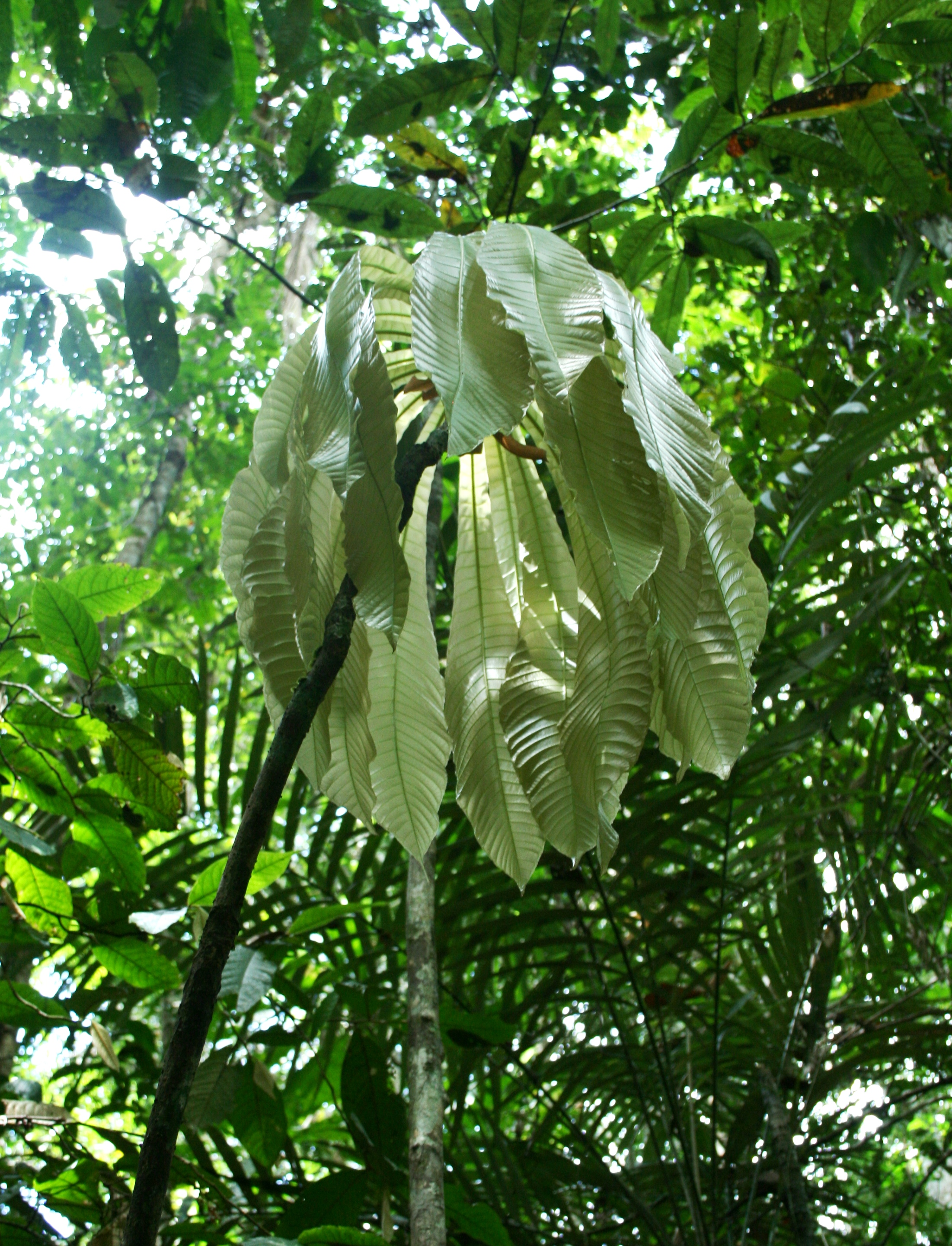 Česky: Pachykaulní stromek Clavija imatacae, Rio Caura, Venezuela